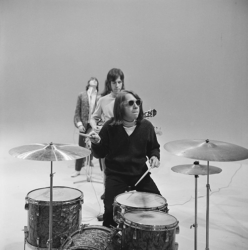 Q65 in het televisieprogramma Fanclub